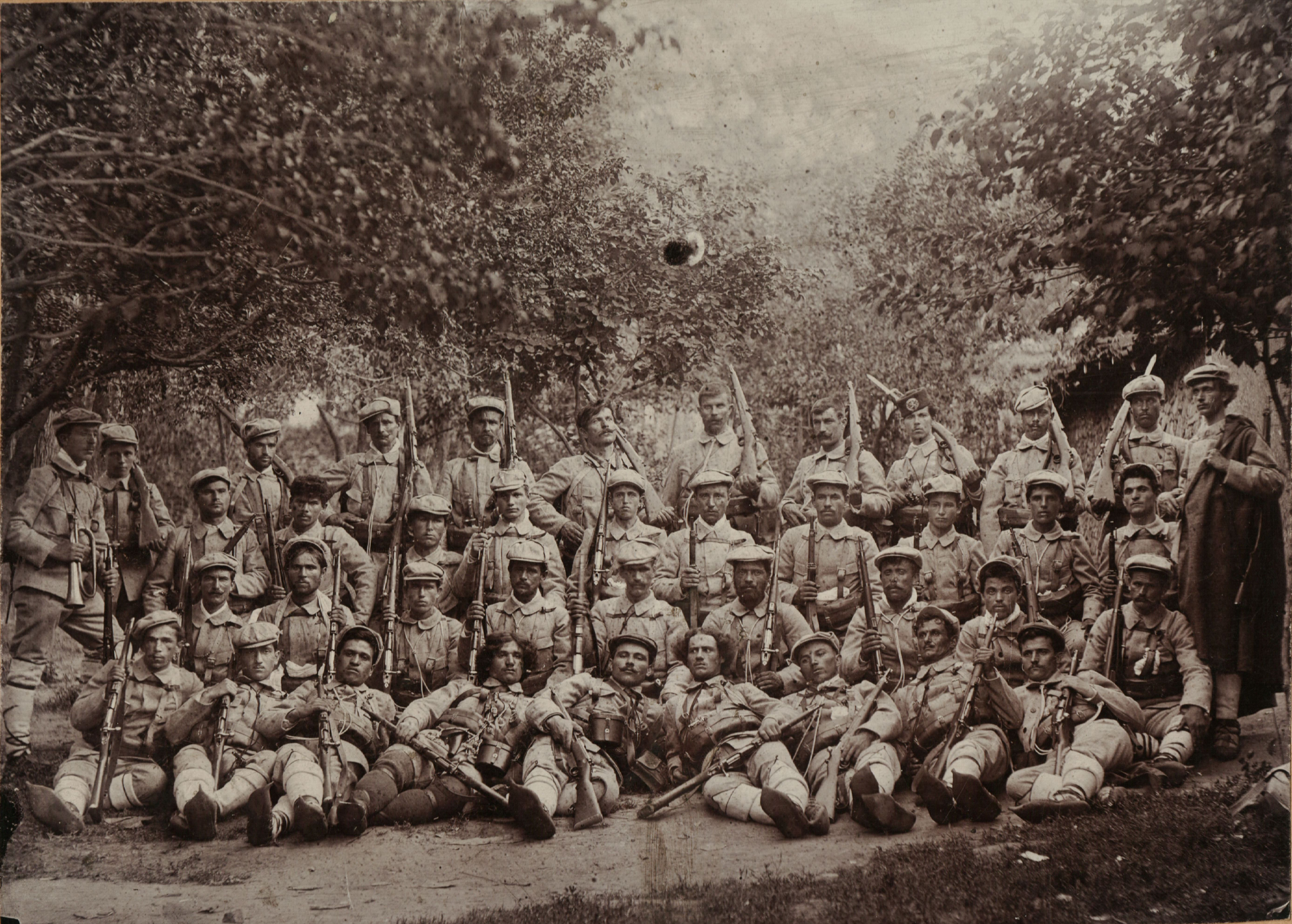 Снимка на избитата „На нож“ Костурска чета, ръководена от Атанас Попов Шестевски и Трендафил Думбалаков